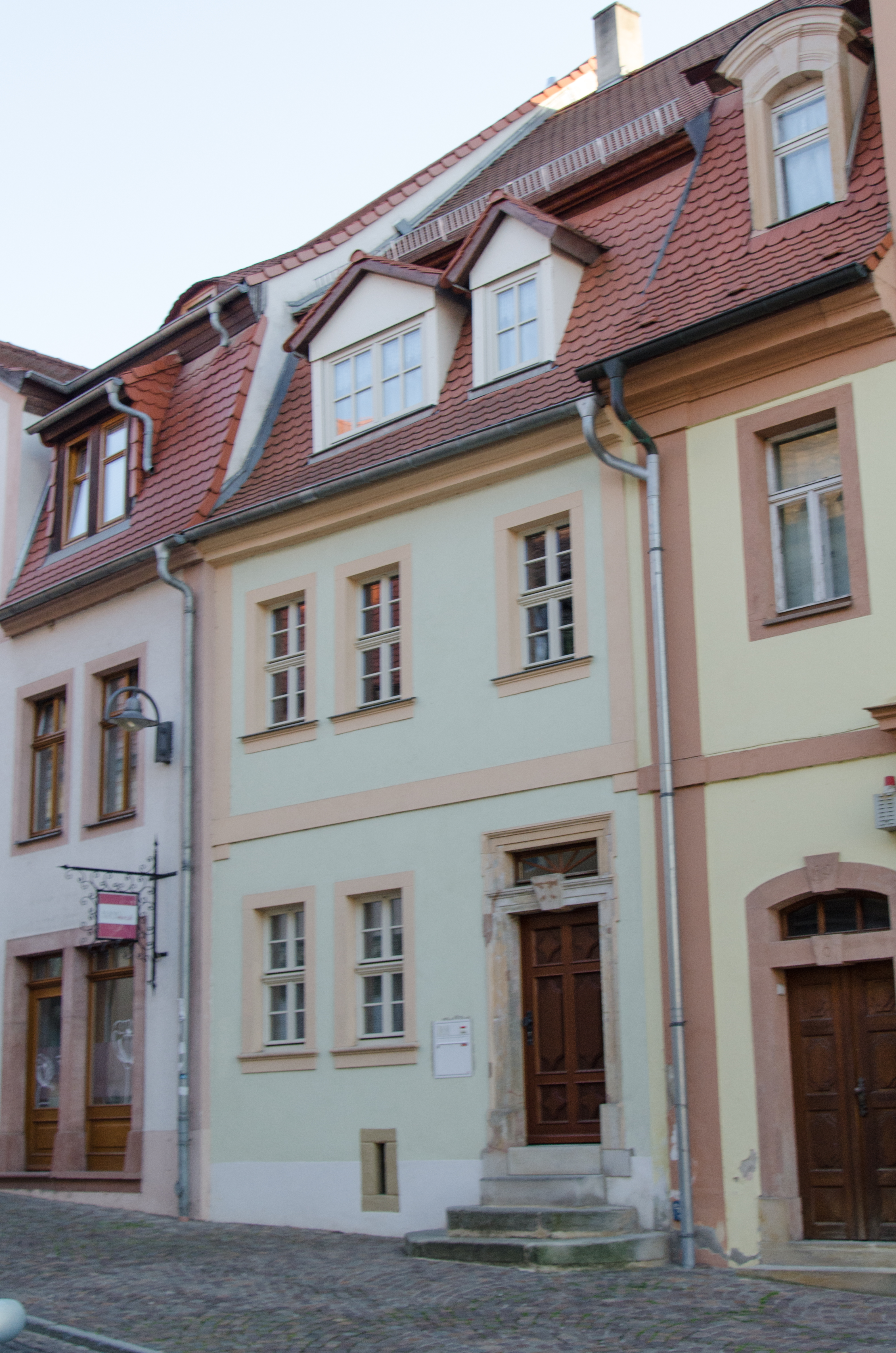 Querfurt, Nebraer Straße 8